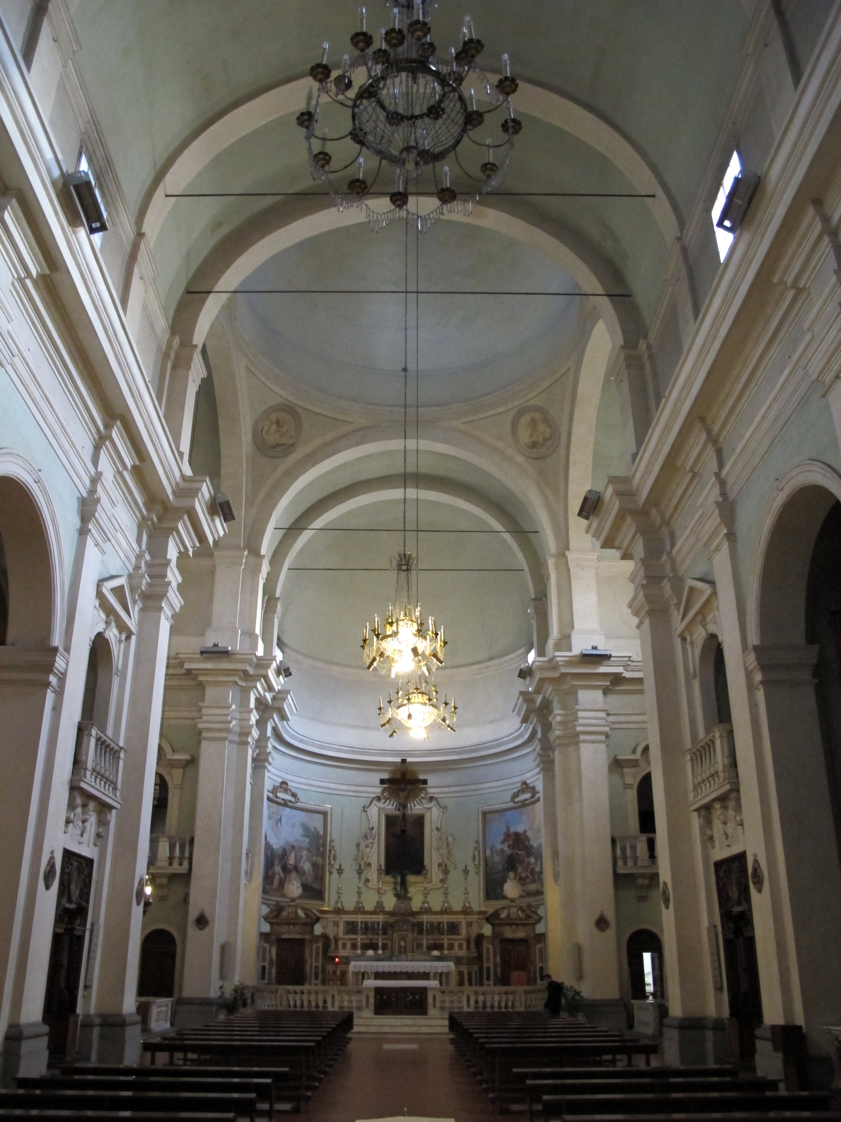 San Paolino (Firenze)